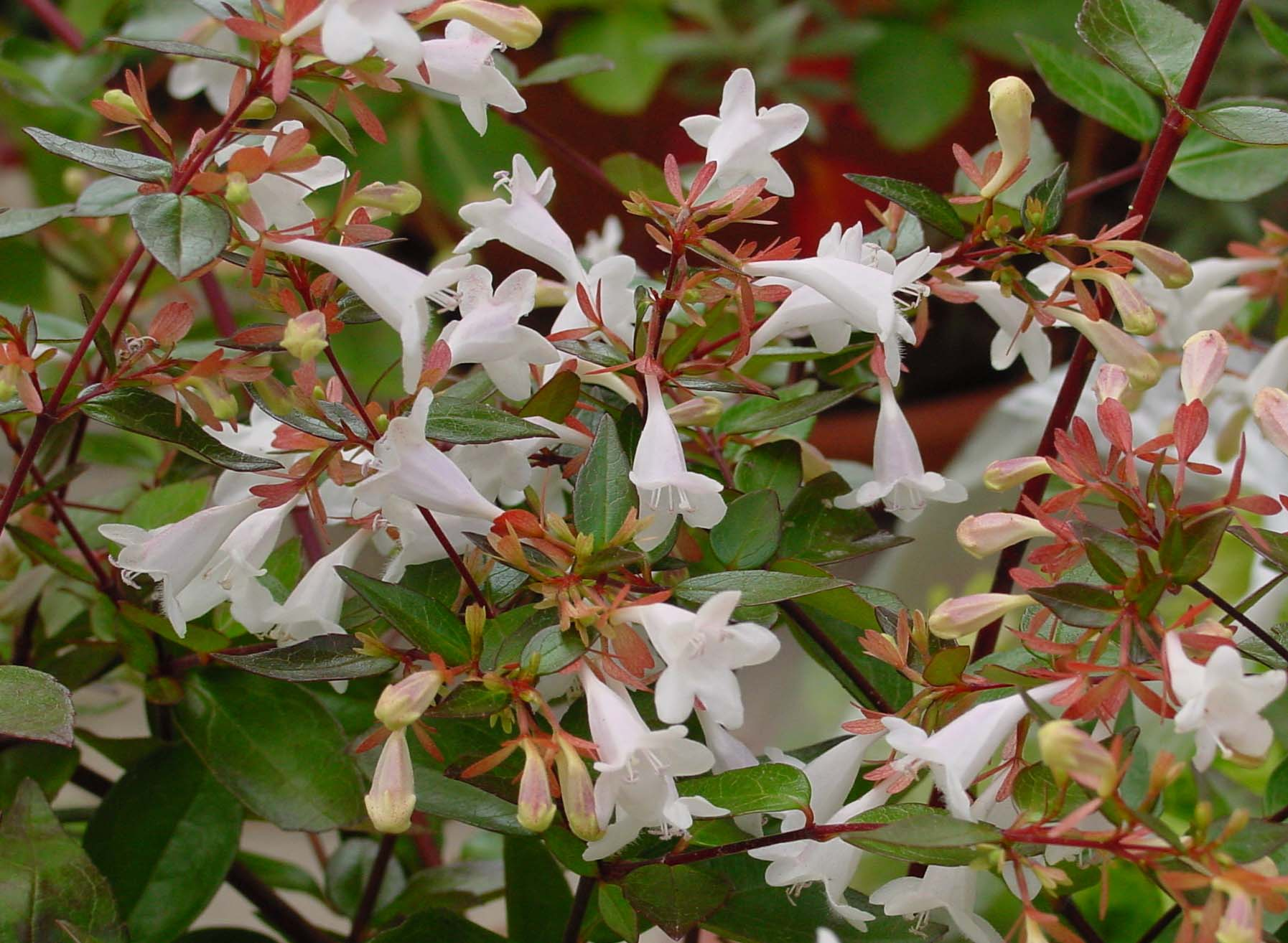 Abelia x grandiflora 'Conti'